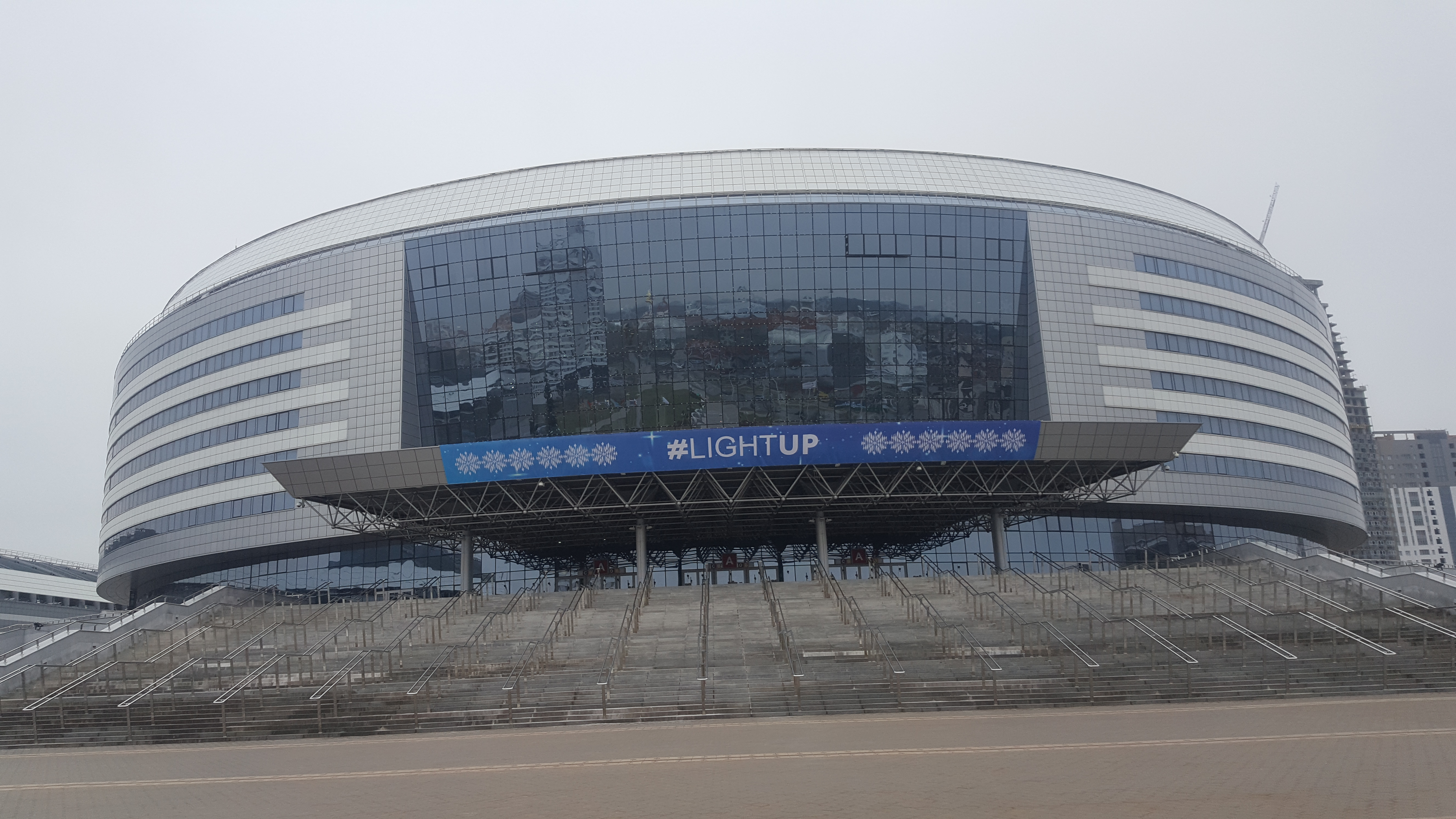 Hala Mińsk Arena przed 16. Konkursem Piosenki Eurowizji dla Dzieci w Mińsku, 24 listopada 2018.